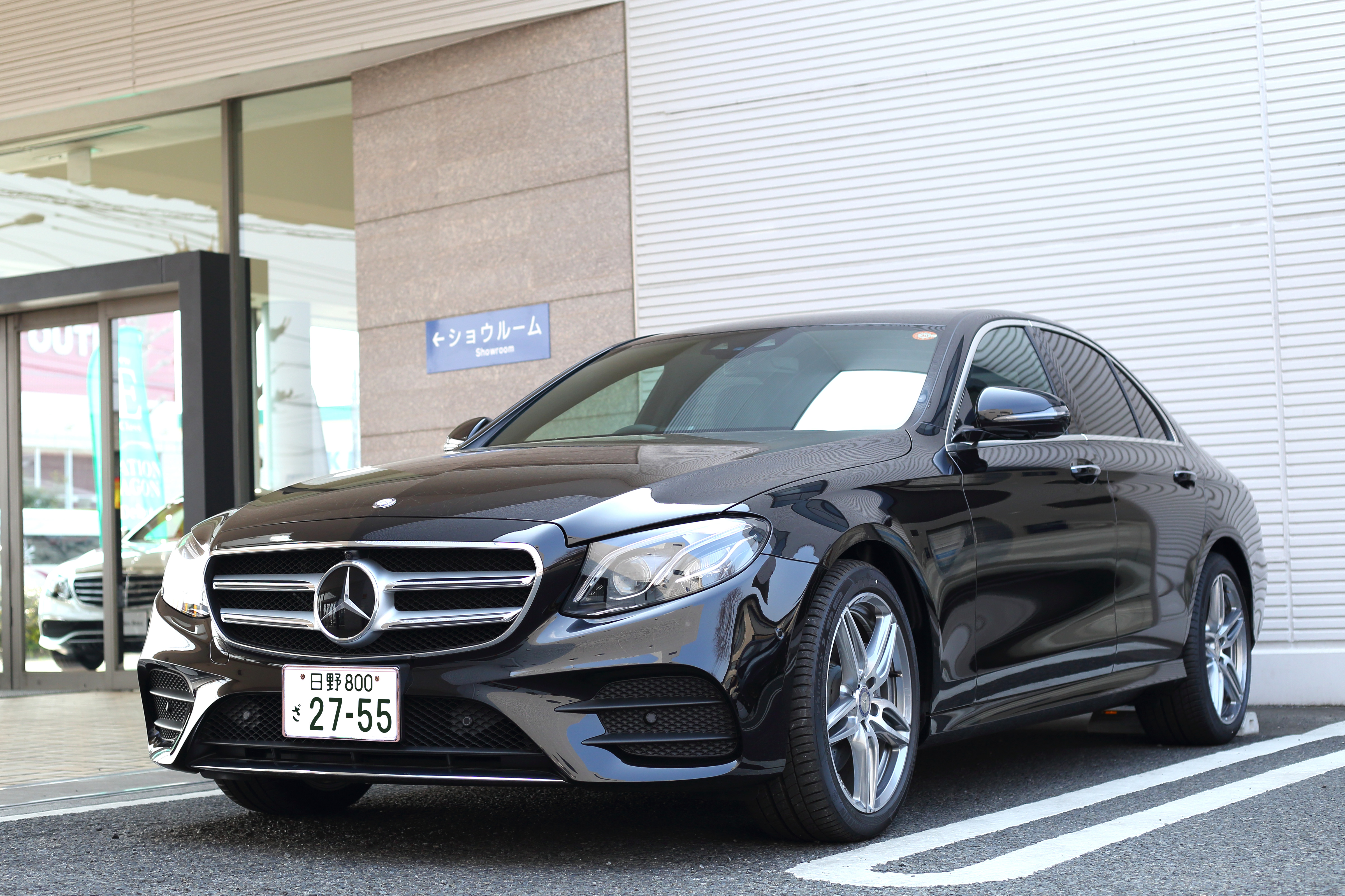 メルセデス・ベンツEクラス（メルセデス・ベンツ・W213）